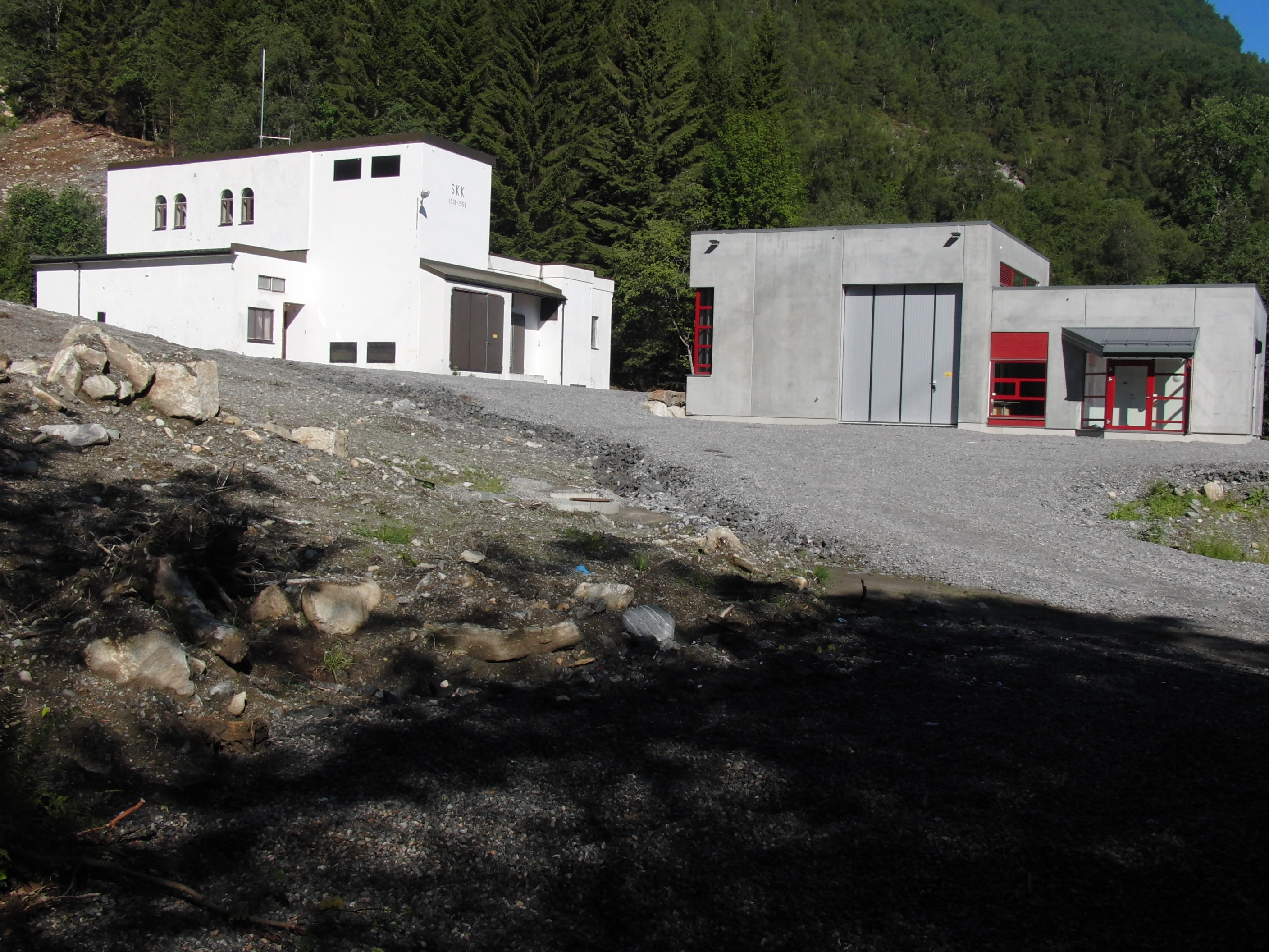 Riksheim gamle og nye kraftverk